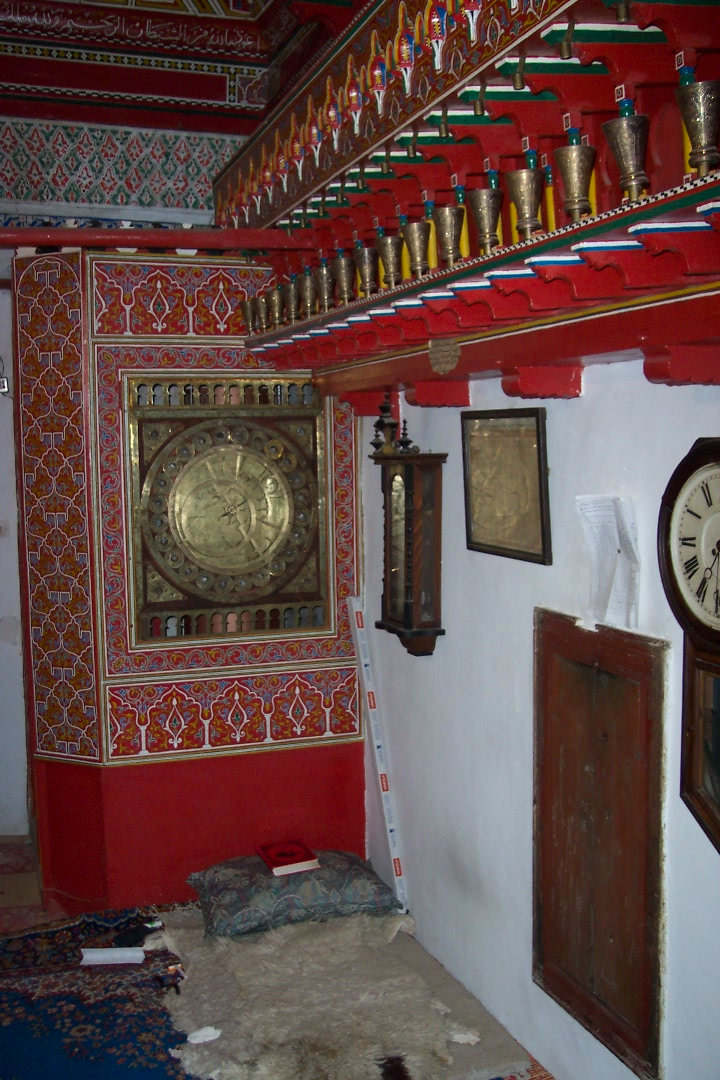 La grifa ou se trouve l'horloge astronomique de la Qarawiyyin